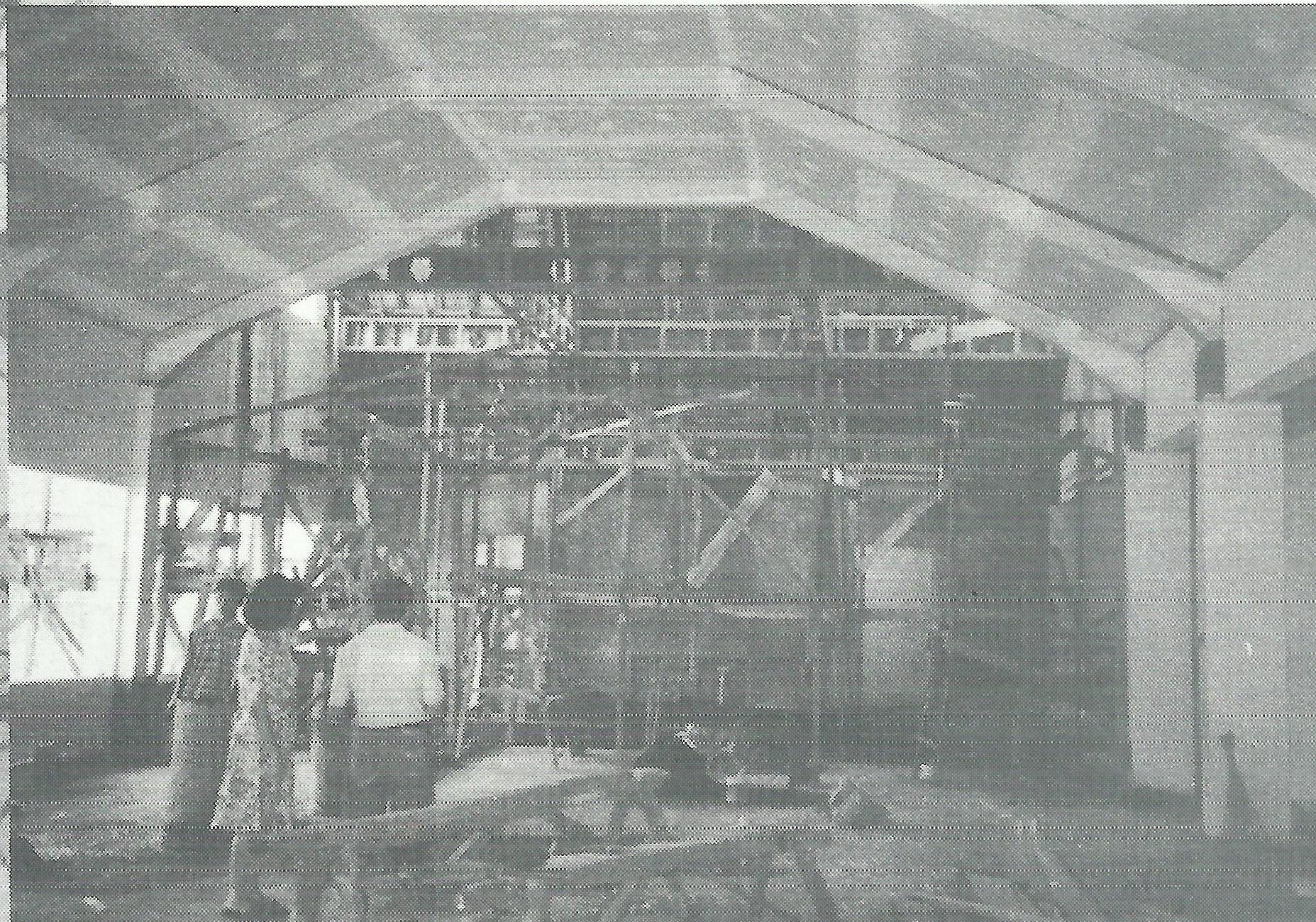 Panitia senantiasa mengikuti perkembangan pembangunan.